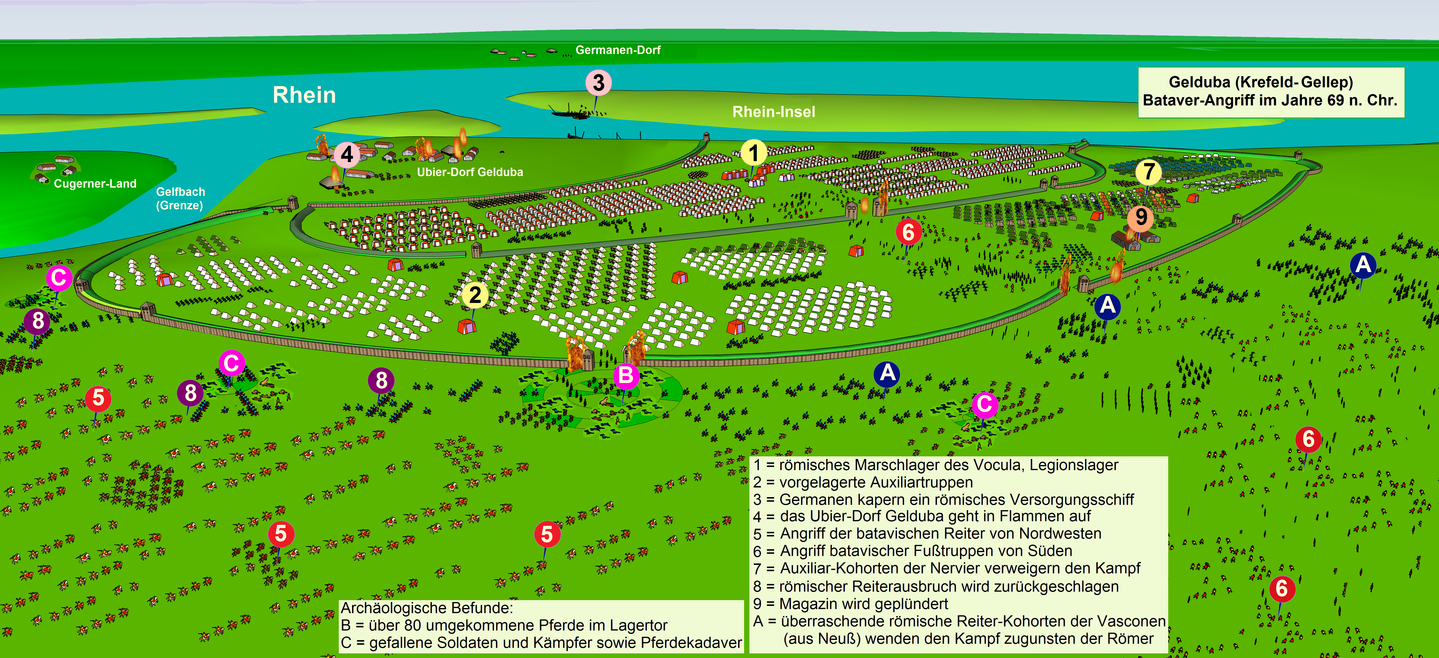 Bataver-Überfall auf Gelduba (Krefeld-Gellep) 69 n. Chr.